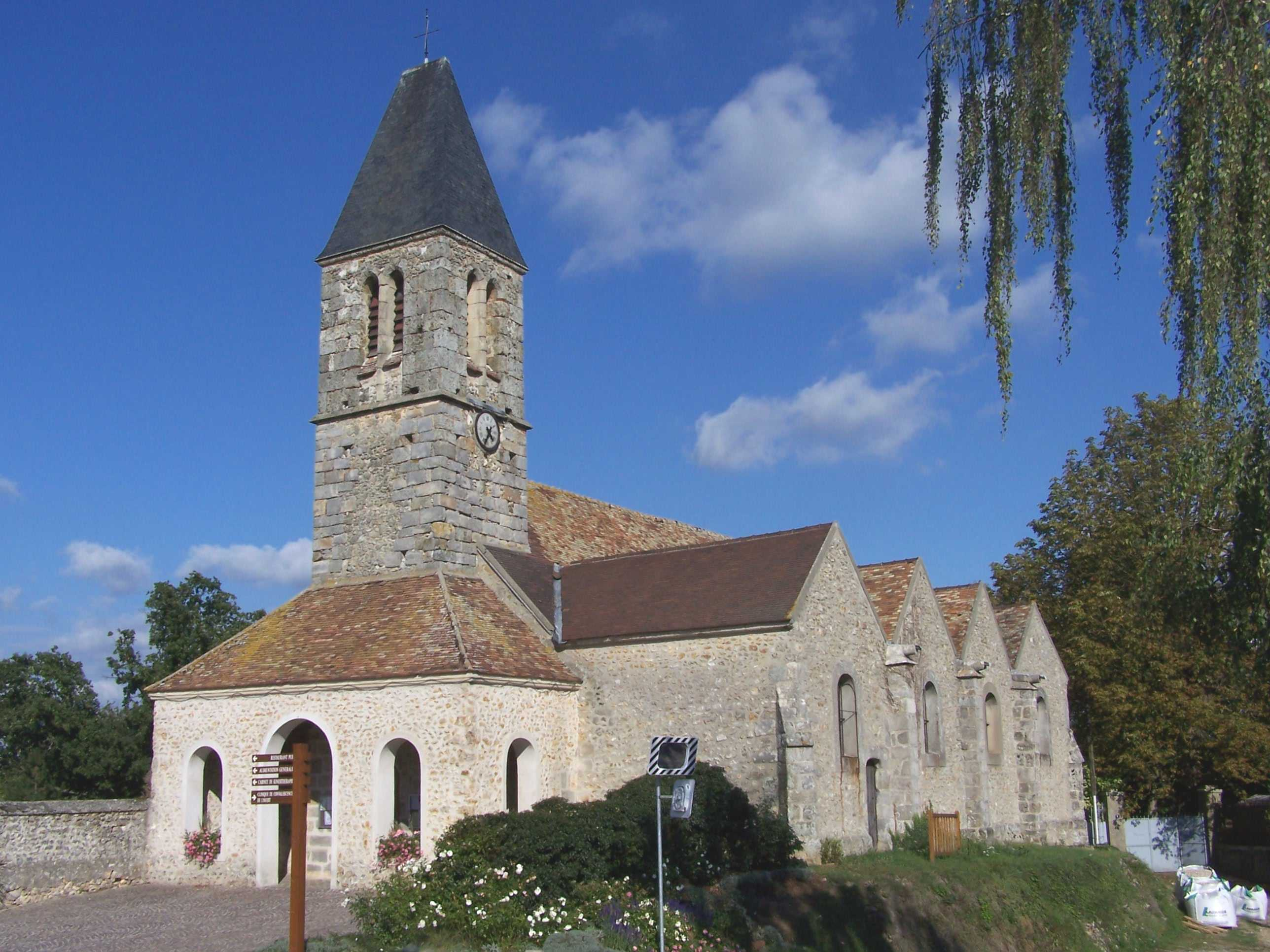 Église de Saint-Rémy-l'Honoré (Yvelines, France)